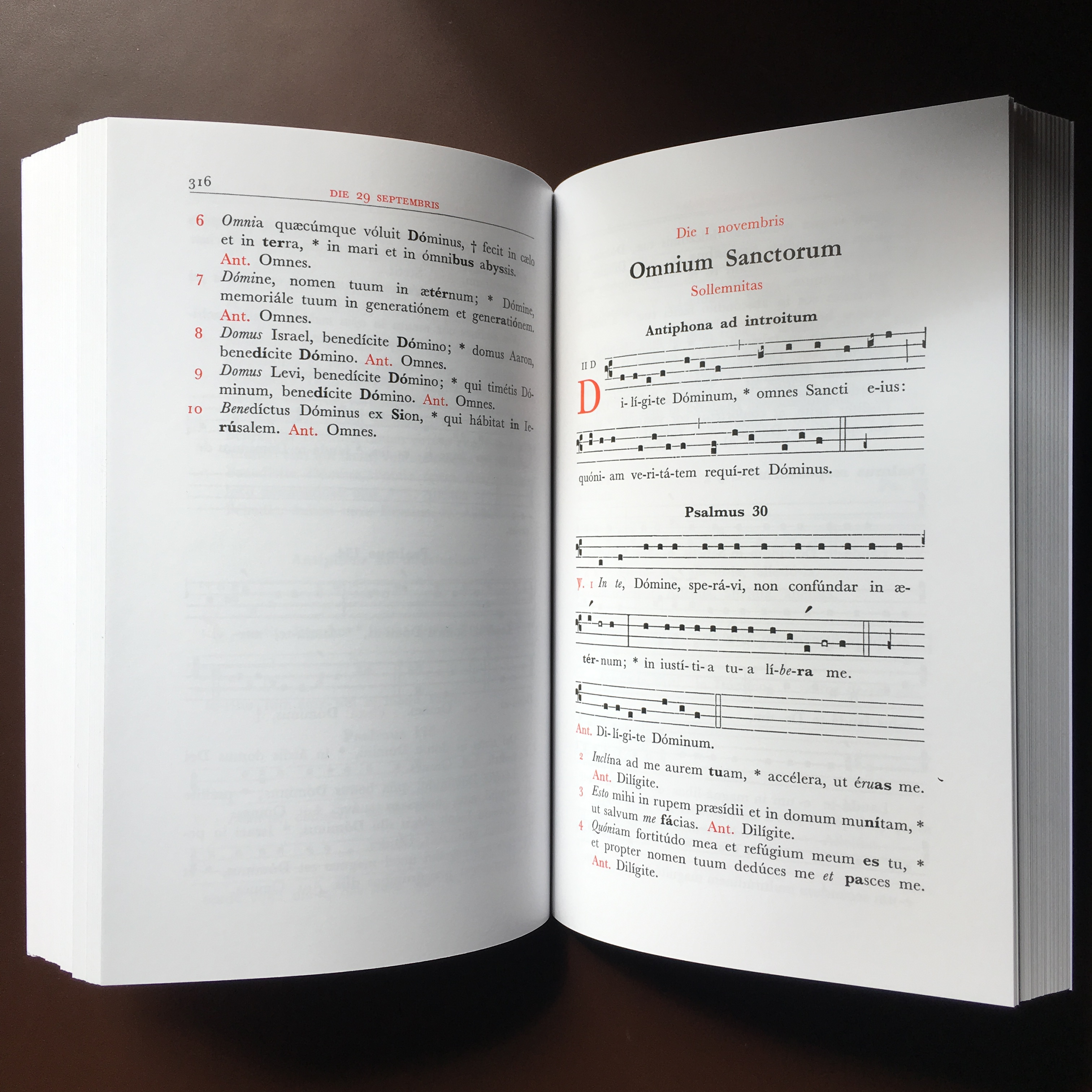 Graduale Simplex, solennité de la Toussaint, 1er novembre, page 317. Psaume 31 (30 selon la numérotation grecque).